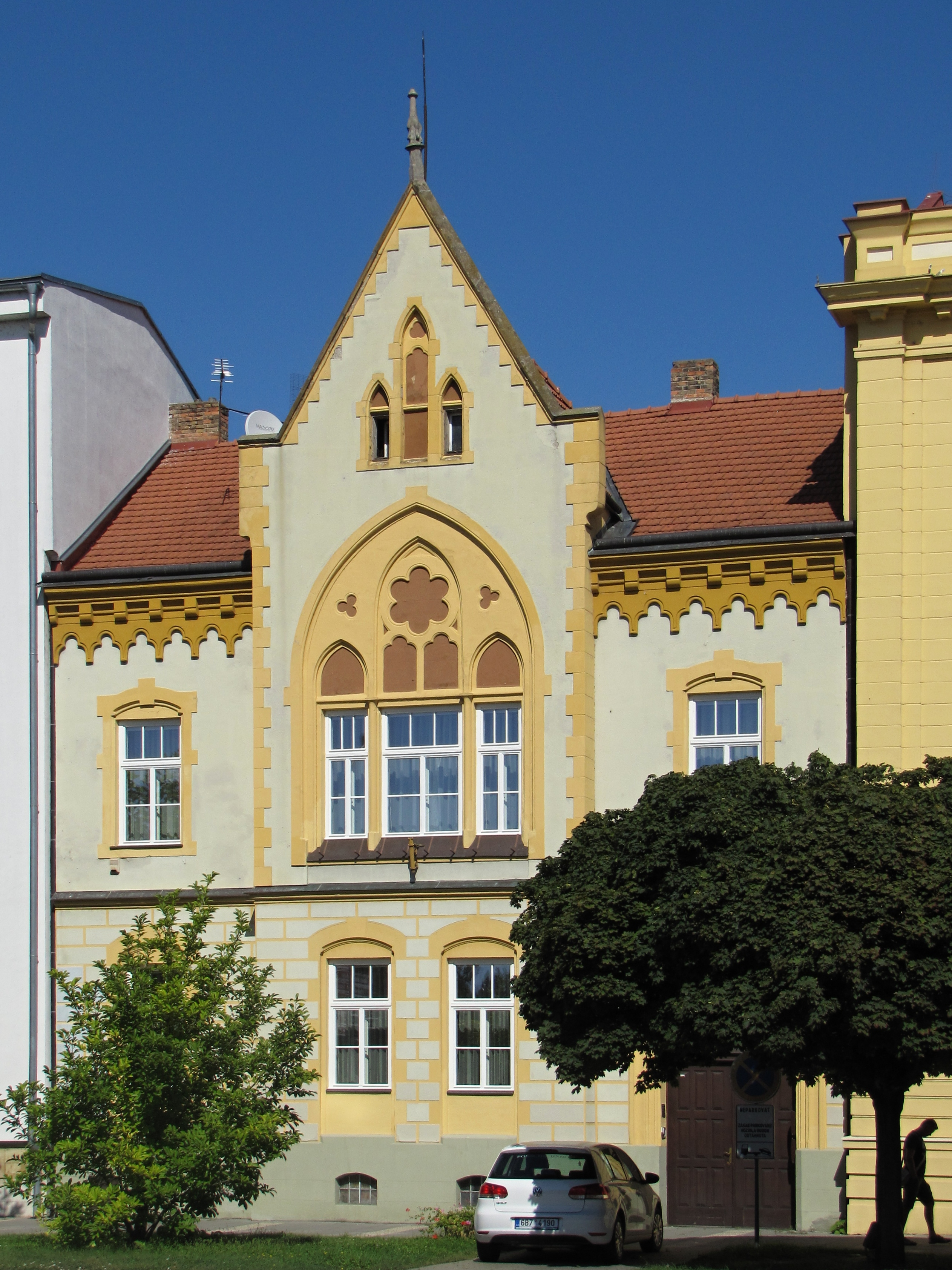 Římskokatolická fara na náměstí T. G. Masaryka v Břeclavi